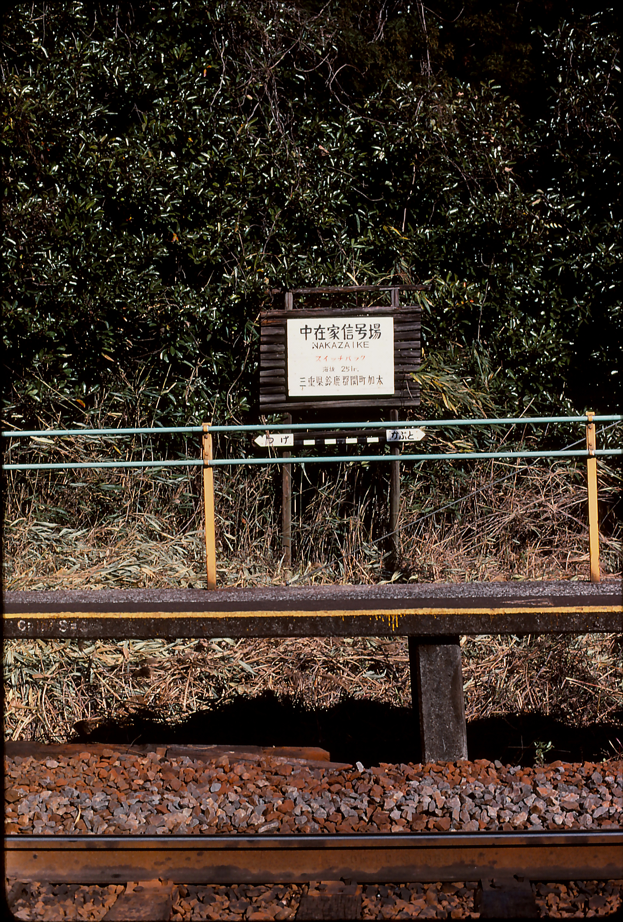 中在家信号場表示板 三重県亀山市加太中在家